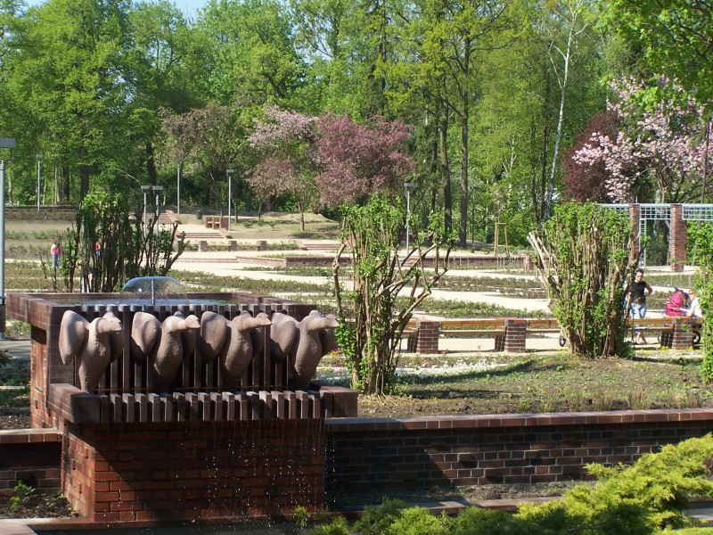 Ogród Różany (Różanka) w Szczecinie